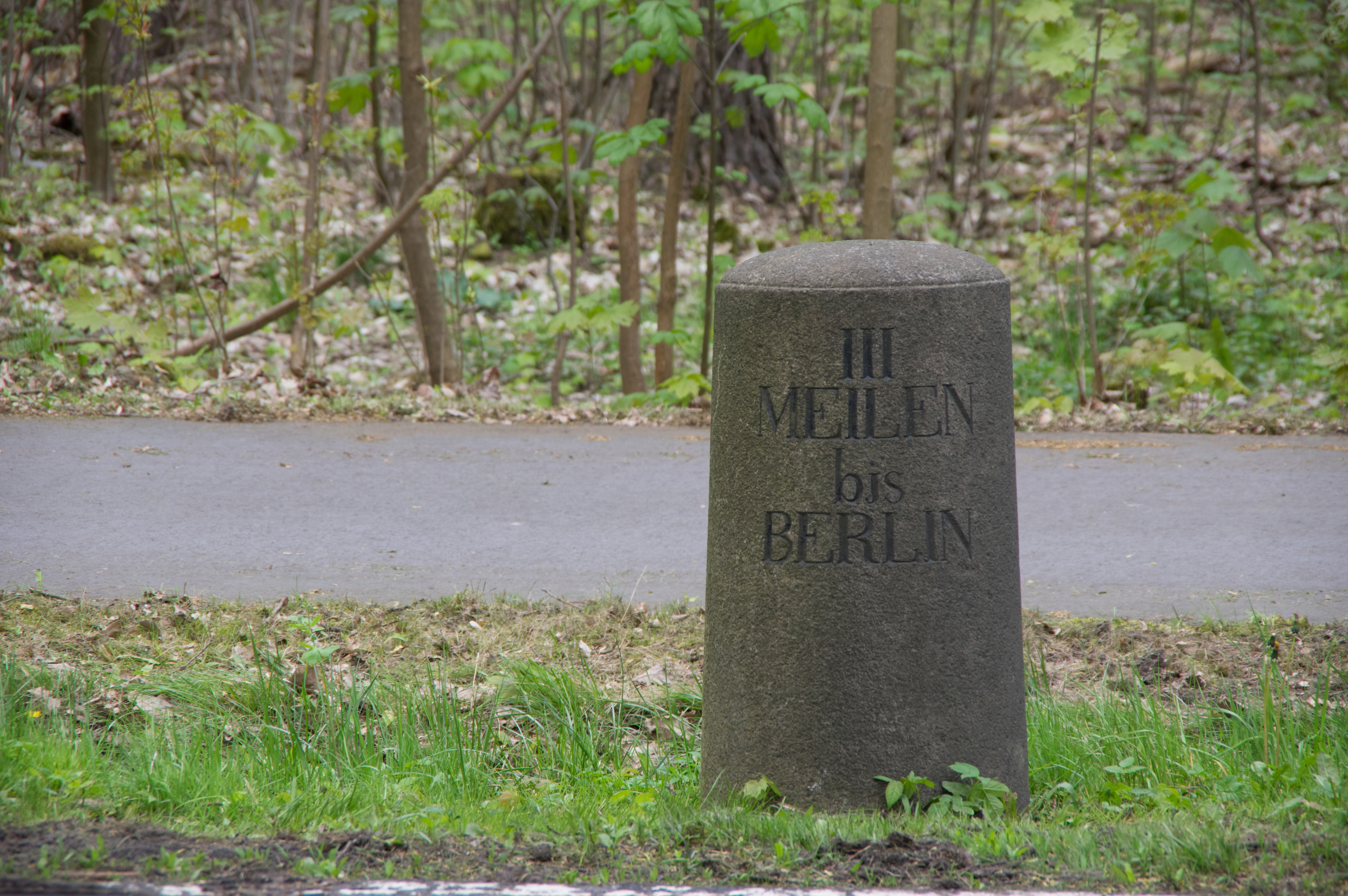 Zeuthen in Brandenburg. Der Meilenstein steht unter Denkmalschutz. Er steht etwa 400 nördlich des Kreisverkehres an der L400.